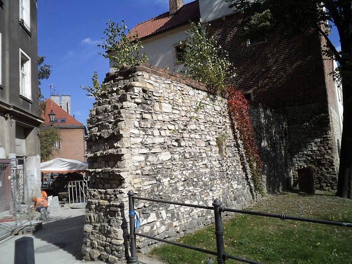 Gliwice - mury miejskie wraz z dwiema bramami (zabytek nr A/1294/83 z 13.01.1983)